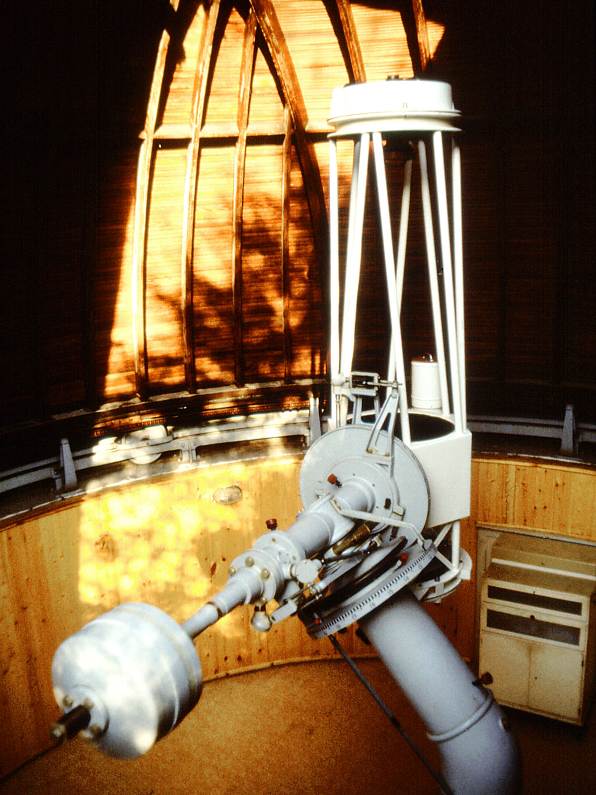 50-cm-Cassegrainteleskop der Forststernwarte bei Jena, einer Aussenstelle der Volkssternwarte Urania Jena